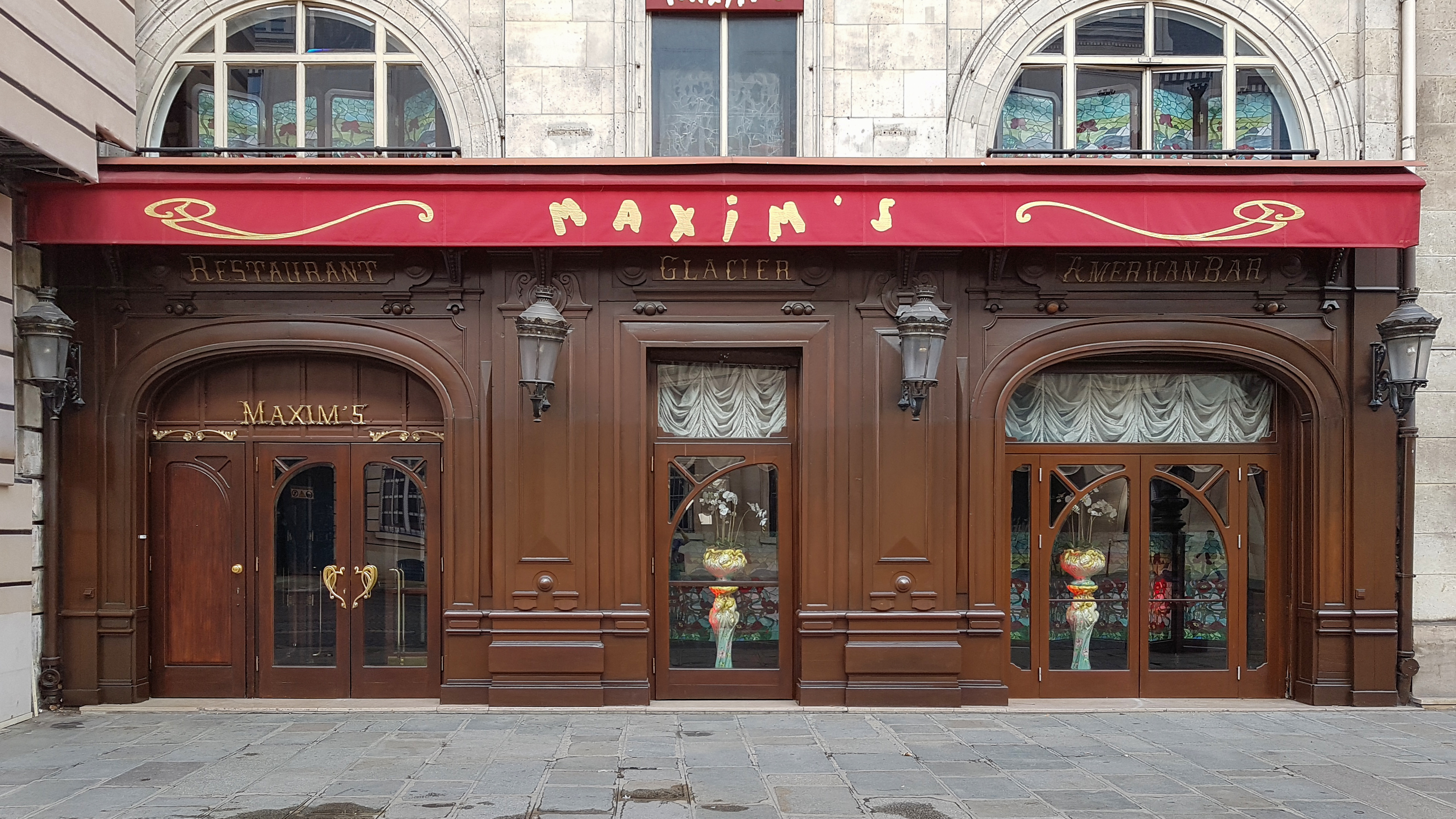 Shop windows in Paris